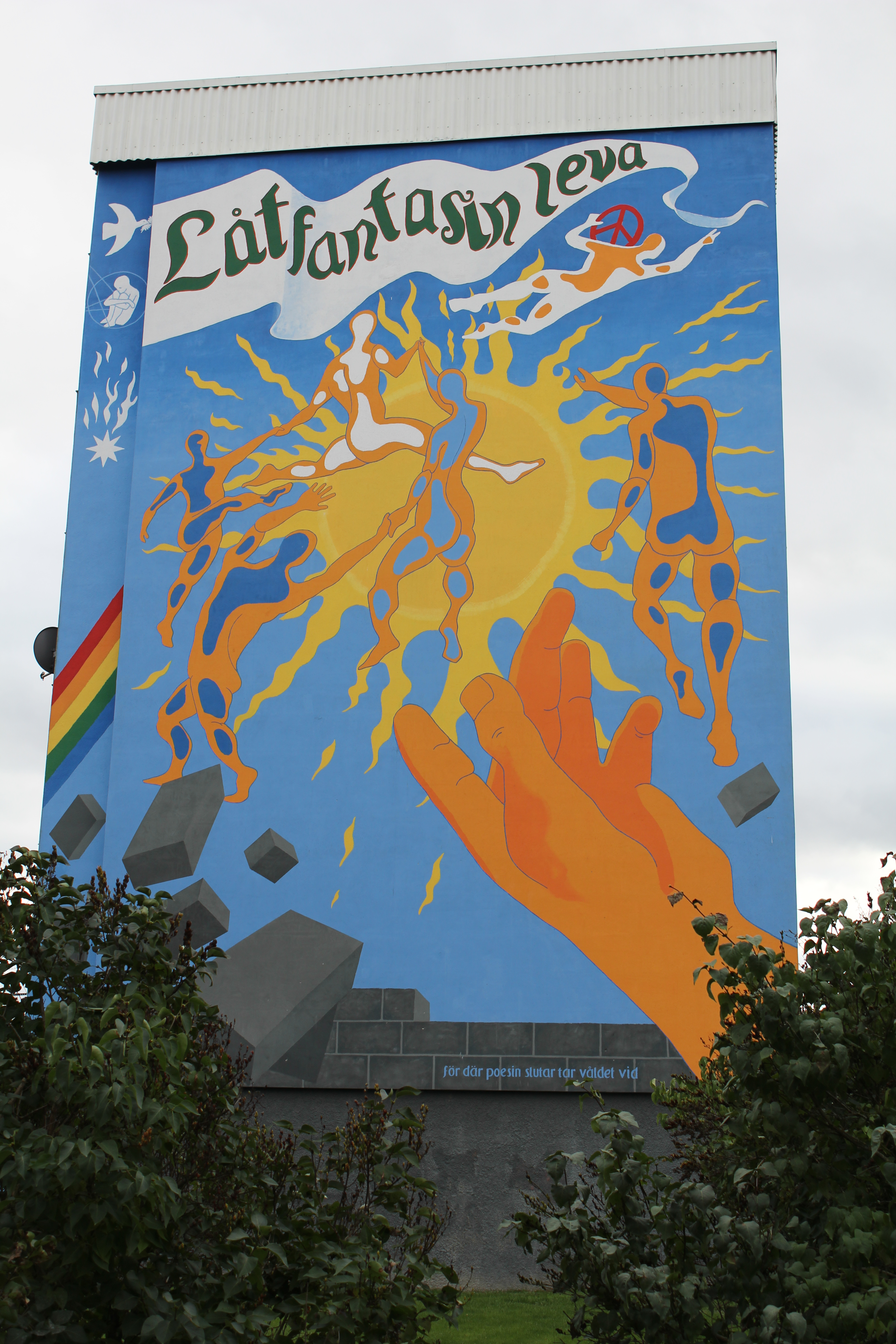 Muralmålningen Låt fantasin leva av Lars Isacson (1981) på kortsidan av ett bostadshus i Storvreten, Botkyrka kommun.